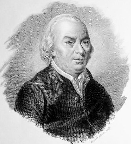 Il poeta Giancarlo Passeroni